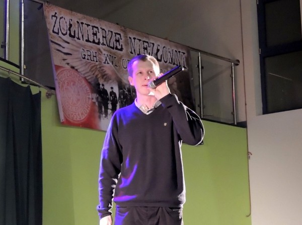 Polish rapper Tadek